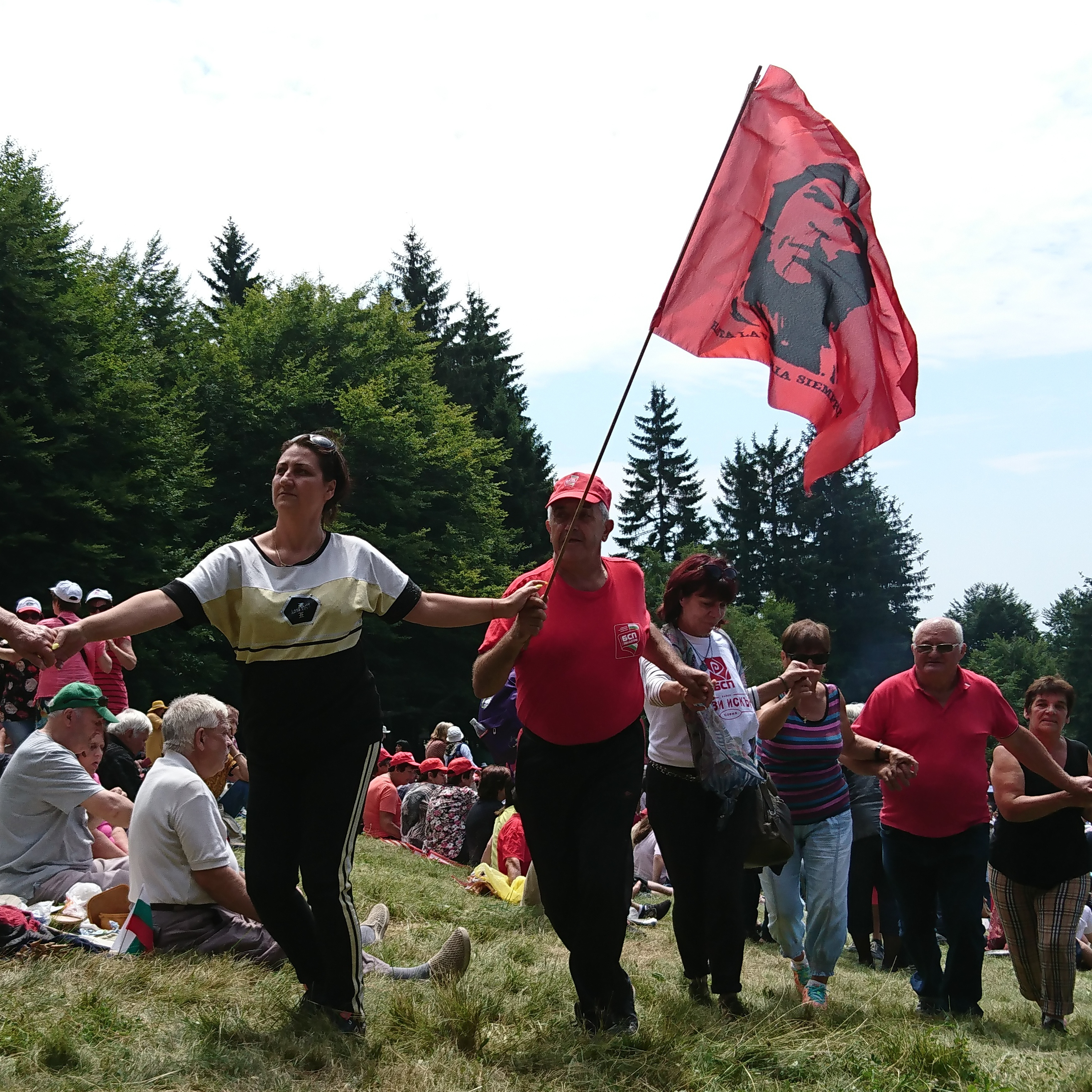 Членове и симпатизанти на Българската социалистическа партия играят хоро на Историческата поляна на Събора на левицата през 2019 г. по случай 128-та годишнина от основаването на Българската социалдемократическа партия на същото място.